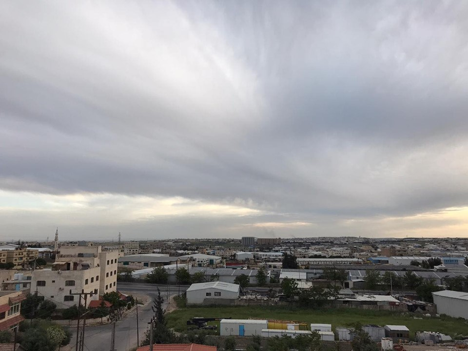 صورة لمنطقة سحاب في عمان عاصمة المملكة الاردنية الهاشمية، حيث تظهر الصورة طبيعة المنطقة الصناعية وتواجد معدات الصناعة في المناطق الخالية بجانب الأحياء السكنية